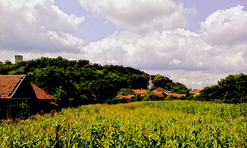 Поглед на Град Сталаћ са обале Јужне Мораве. Ја, (Бранислав Бајкић (разговор)) сам аутор овог дела. 08.08.2010.